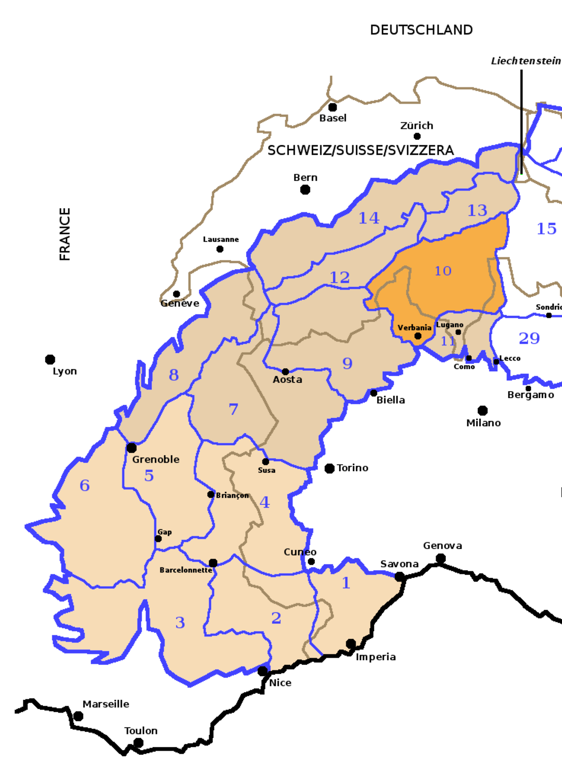 Alpi Occidentali secondo la SOIUSA con evidenziate le Alpi Lepontine